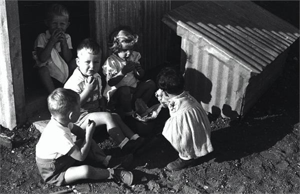 בני ברית (מולדת) - ילדי המושב.